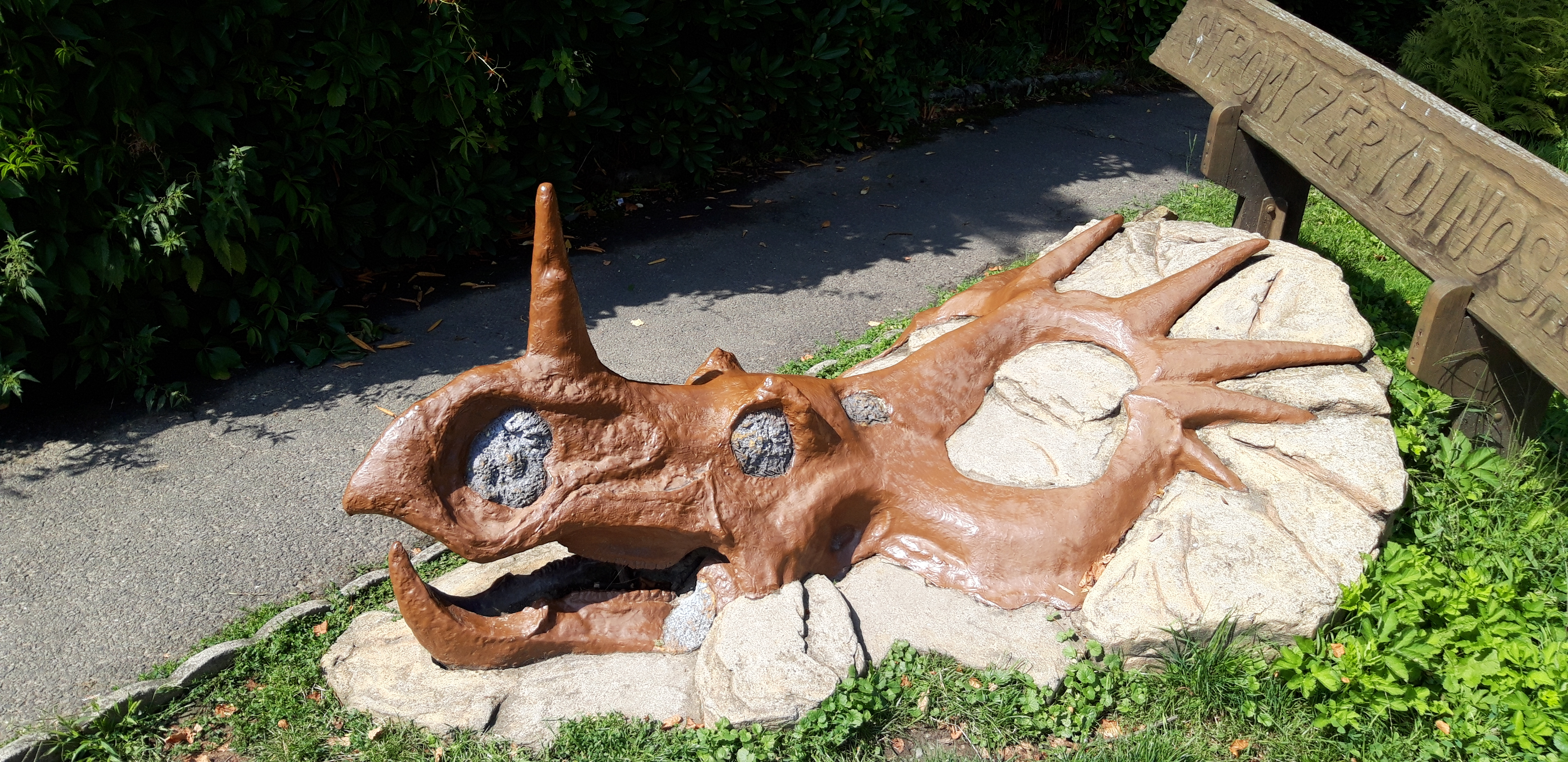 Replika lebky ceratopsida styrakosaura, umístěná před expozicí o evoluci rostlin v areálu Zoologické zahrady ve Zlíně.